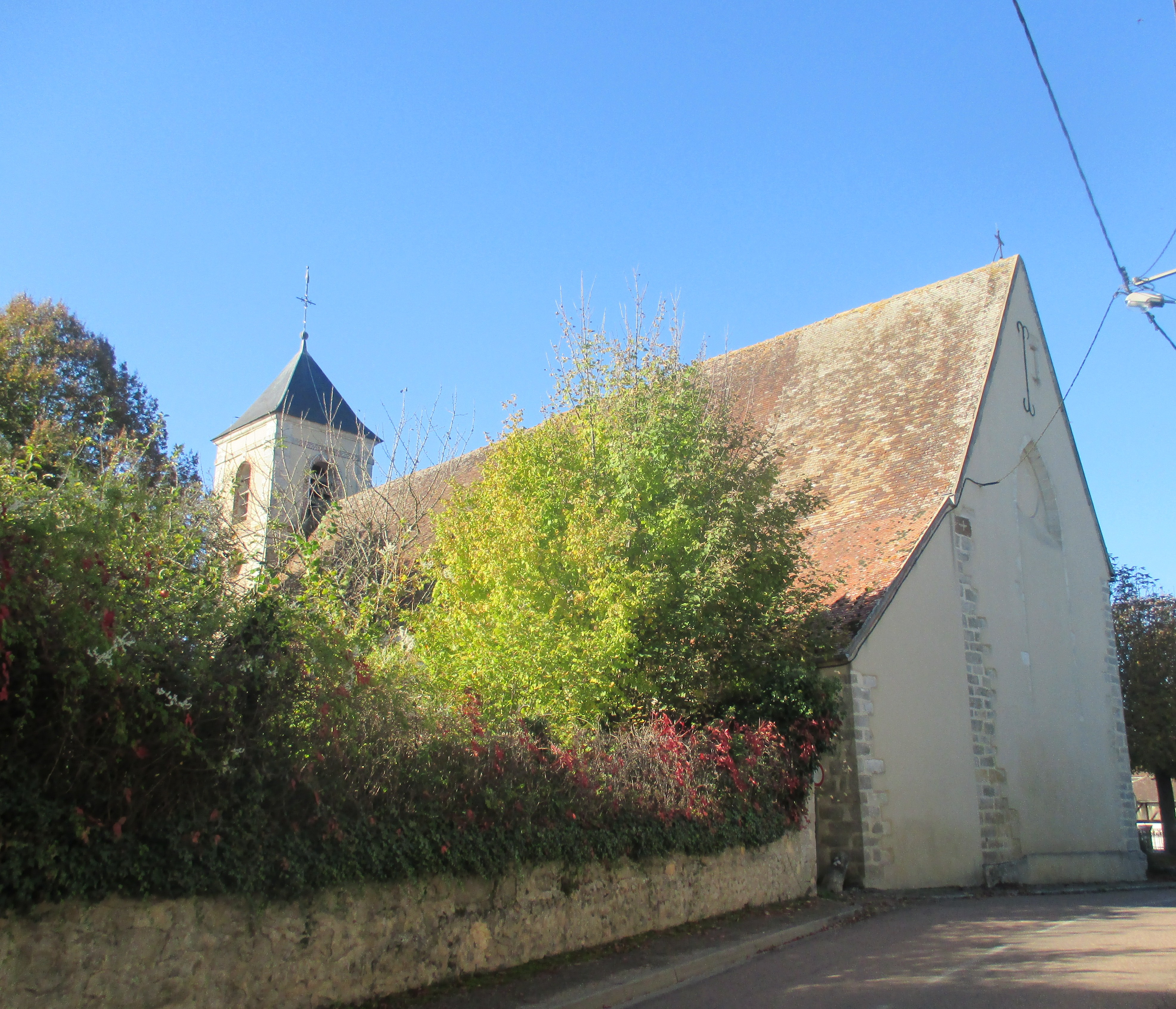 Église Saint-Germain de Marsangy (Yonne)